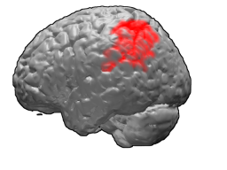 Brodmann area 40